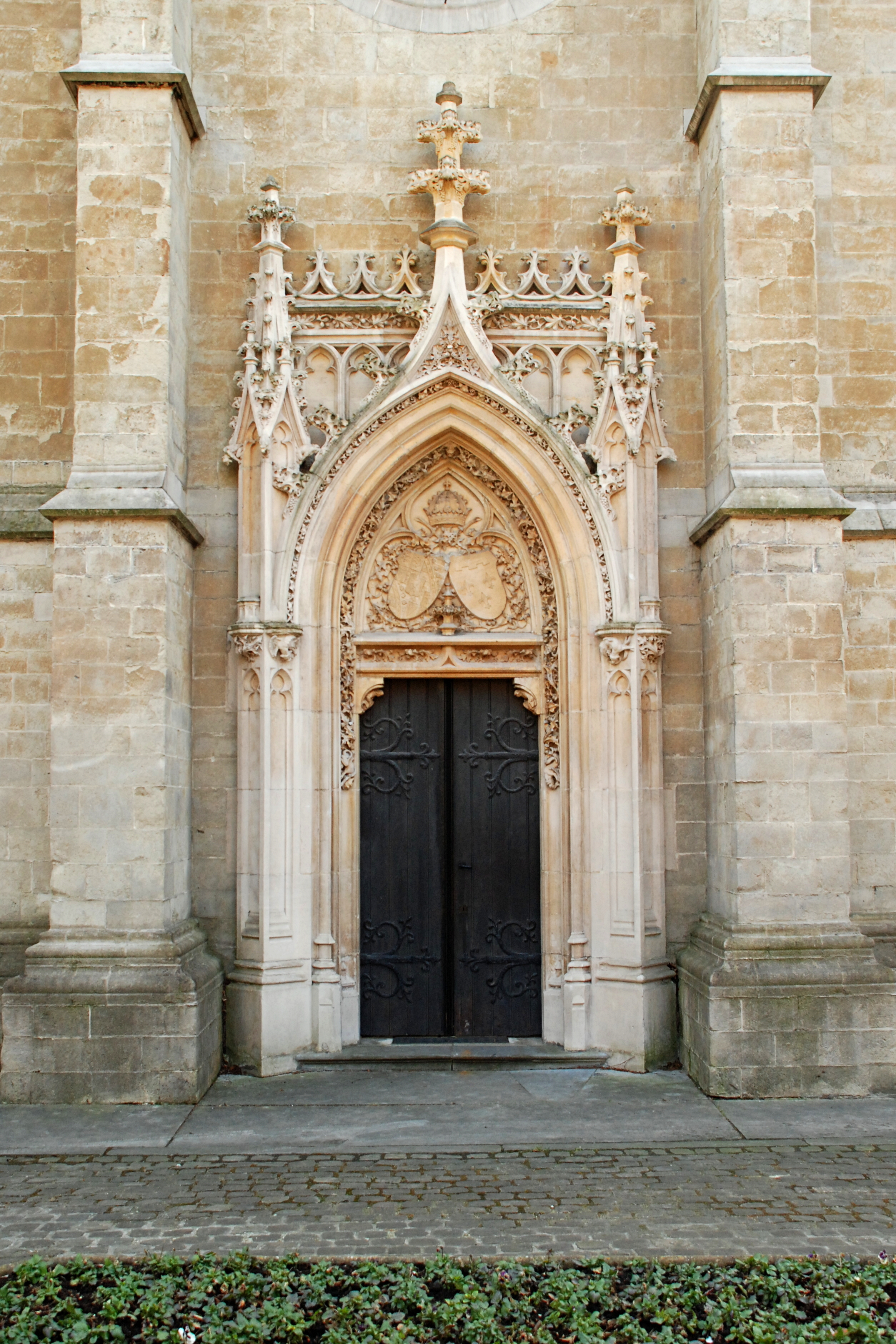 Belgique - Bruxelles - Ancienne église Notre-Dame de Laeken (gothique 13e siècle)